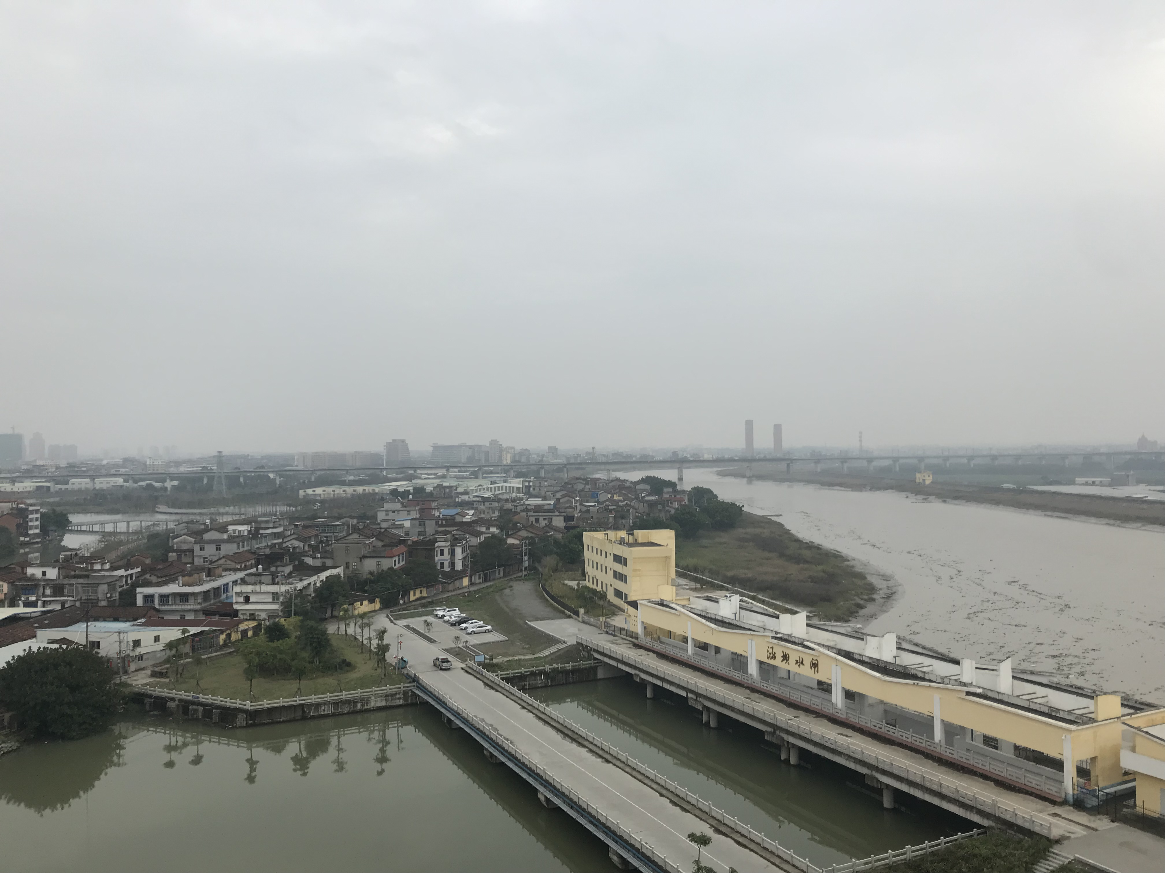 中文（中国大陆）: 陈桥涵坝，造福于民！